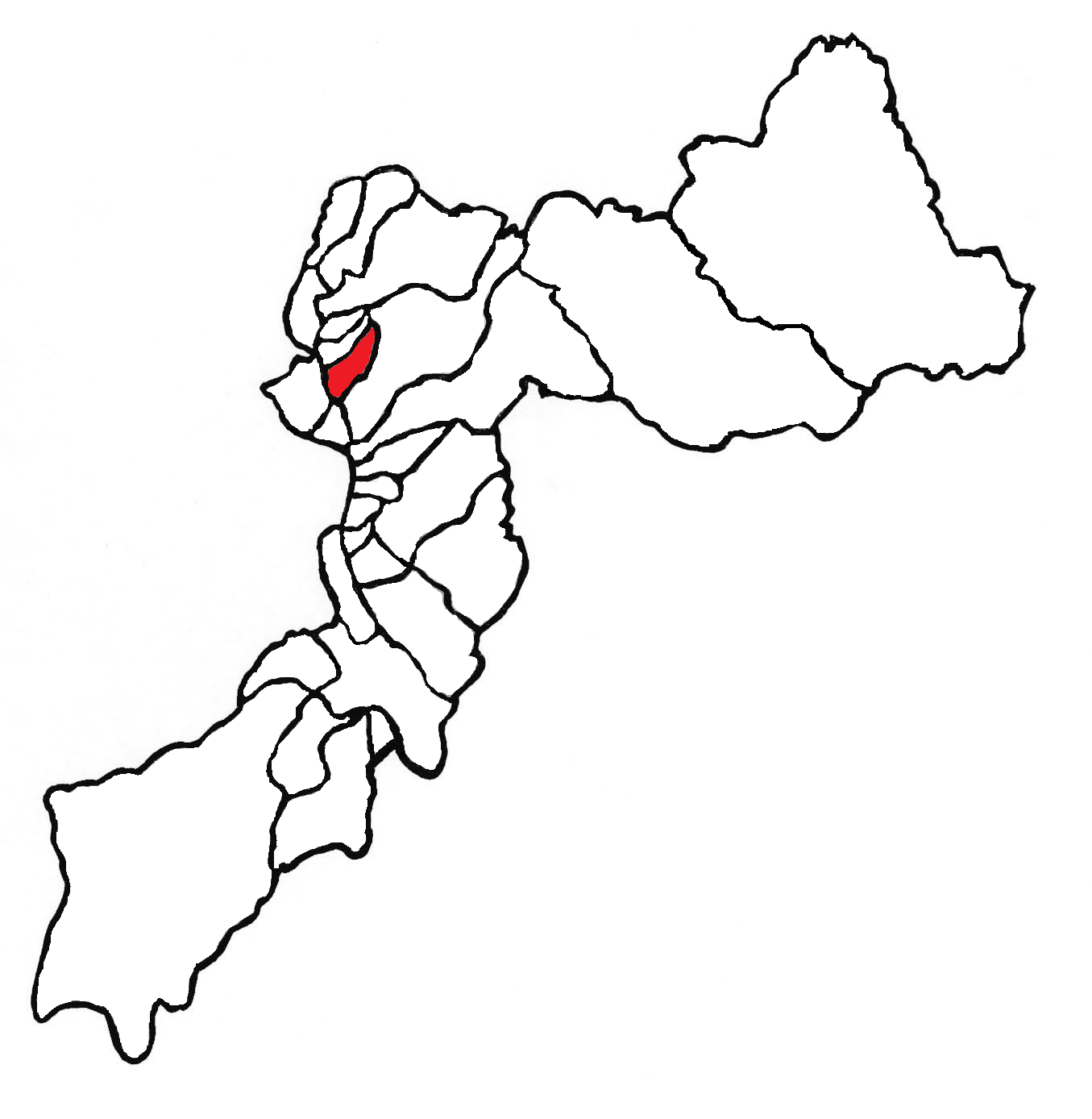 Ubicación del distrito en la provincia de Huancayo, departamento de Junín, Perú